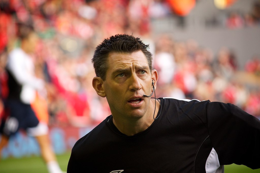 Referee Lee Probert.